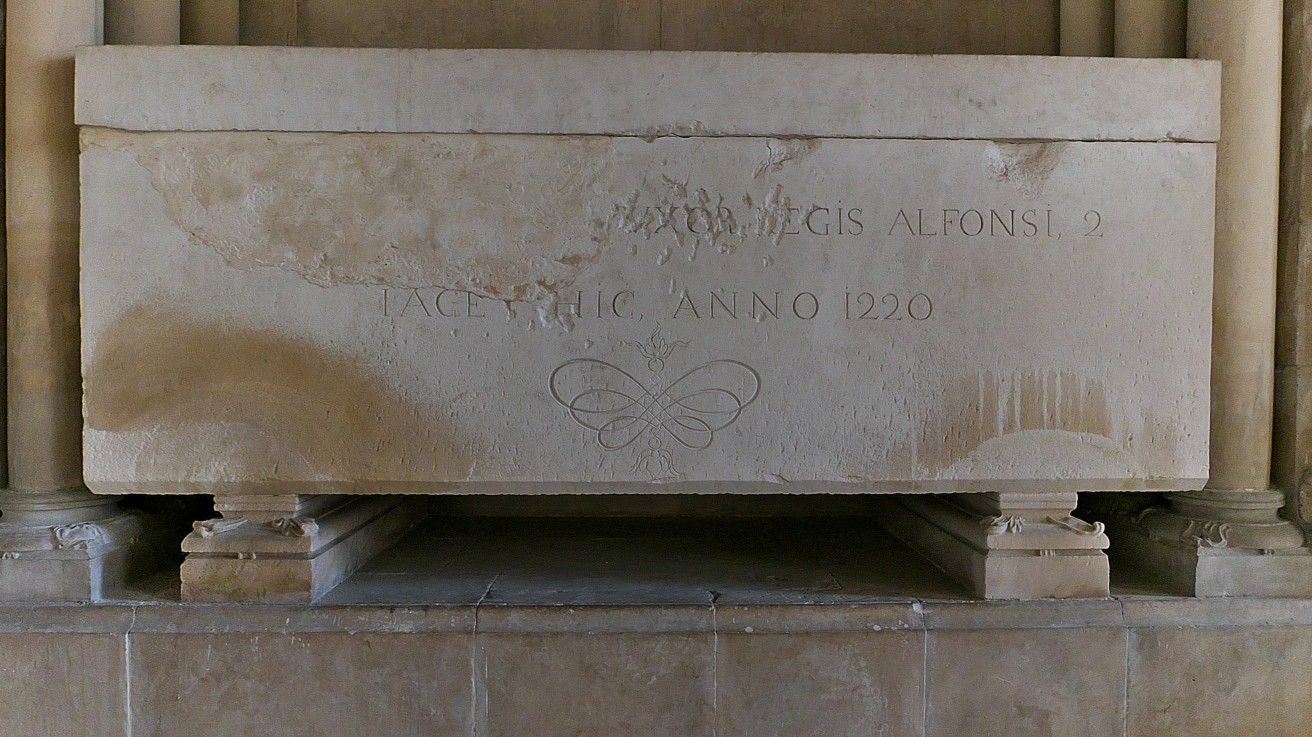 Sepulcro de Urraca de Borgoña, fallecida en Coímbra (†1220), esposa de Alfonso II de Portugal (†1223).